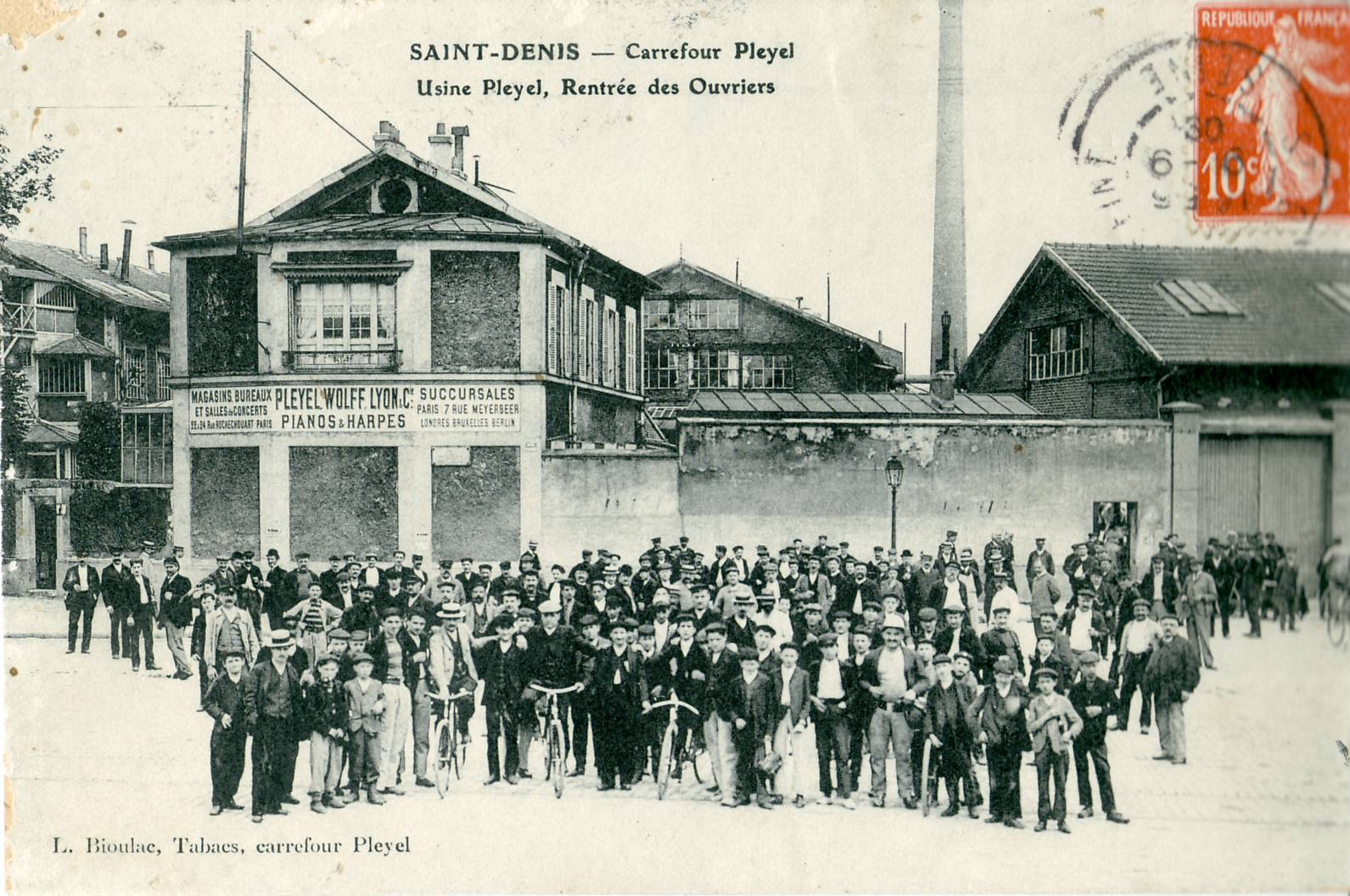 Carte postale ancienne éditée par Bioulac du Carrefour Pleyel à Saint Denis, montrant la manufacture d'instruments de musique Pleyel